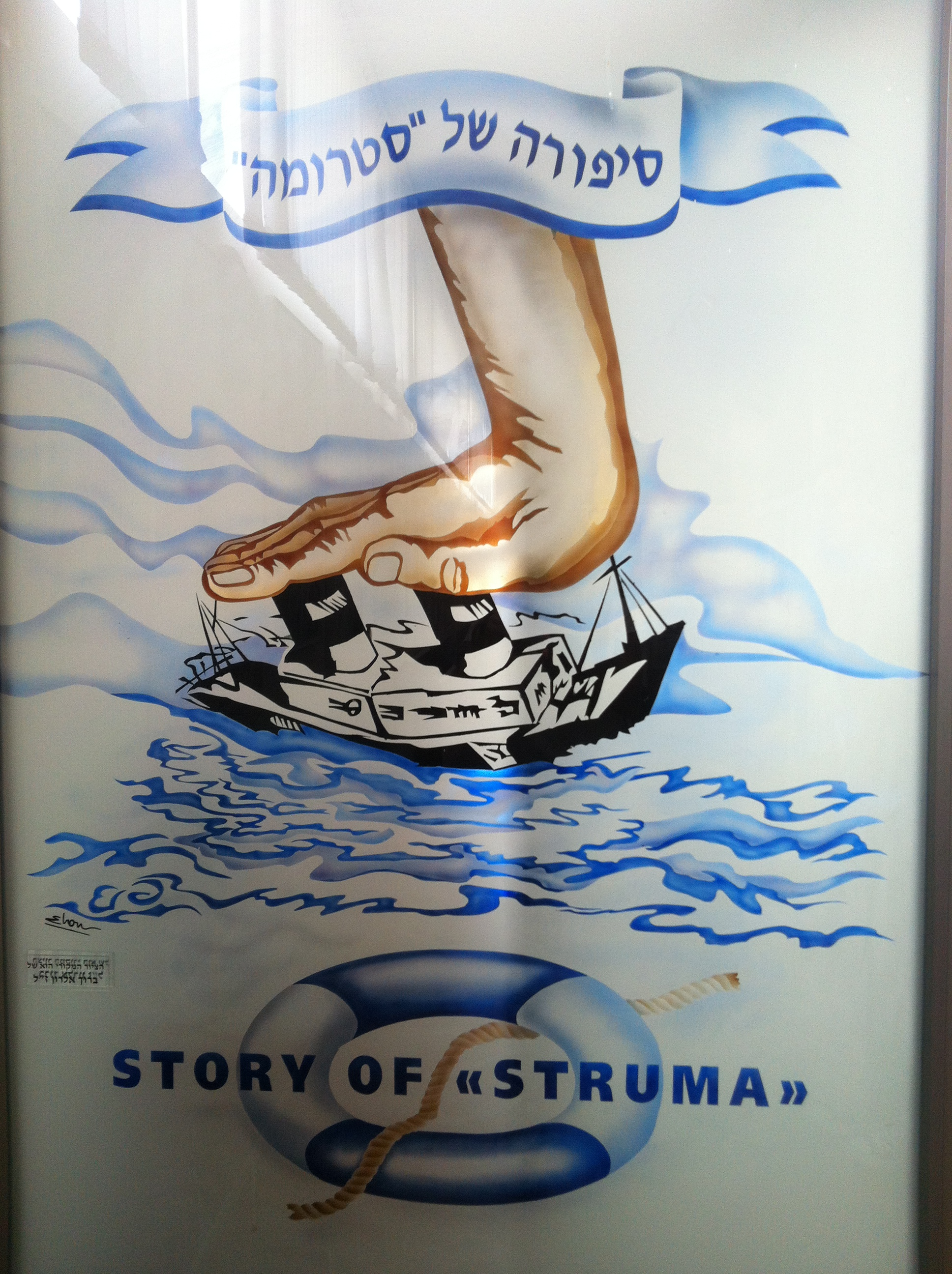 סמל מוזיאון סטרומה